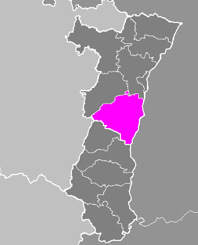 Maps of arrondissements and cantons of France: Arrondissement de Sélestat-Erstein.PNG (Région Alsace)